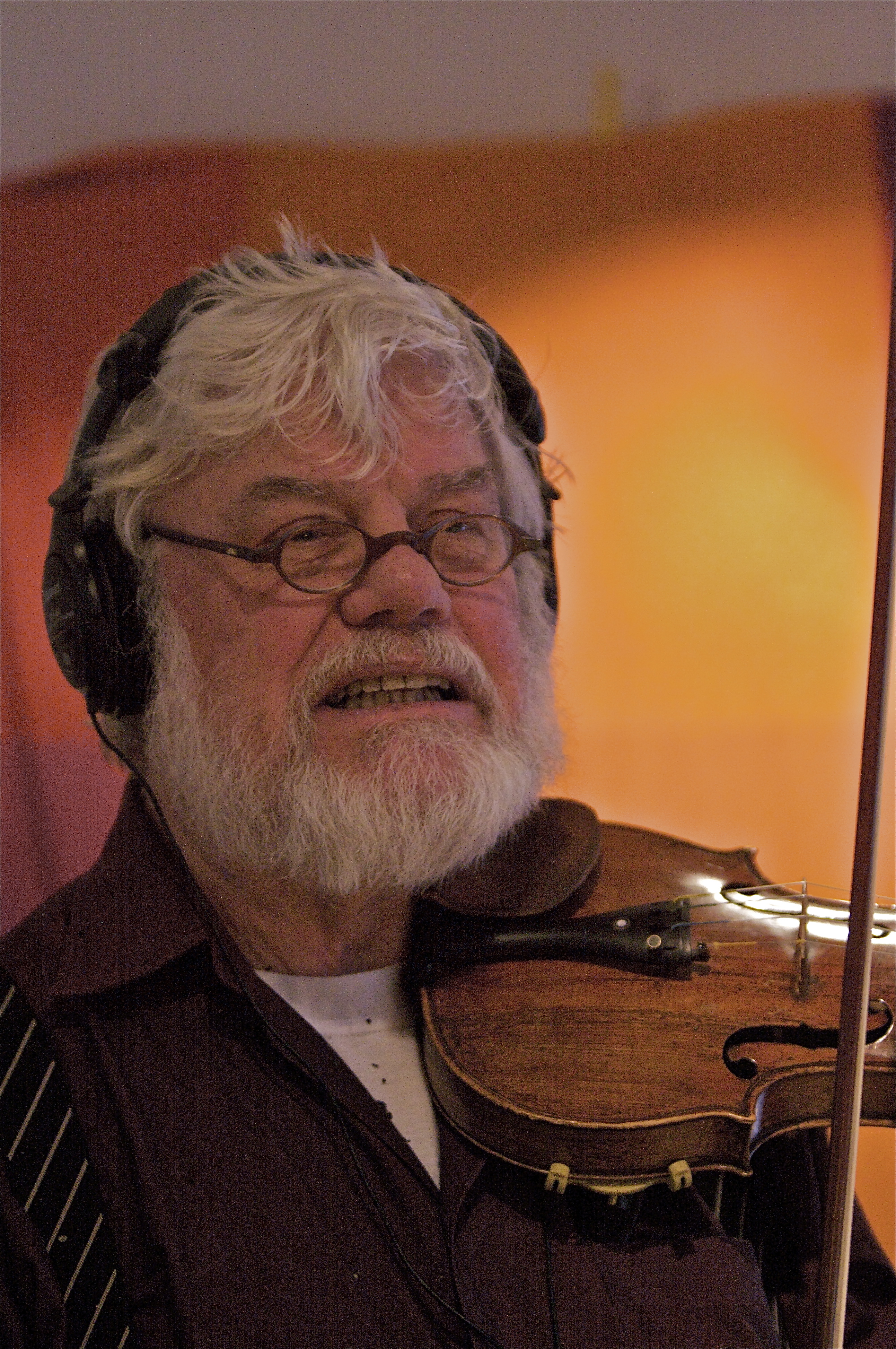 Willem Wolthuis tijdens cd-opname van de nieuwe Cd van Romanesca in studio Toptunes te Hilversm.